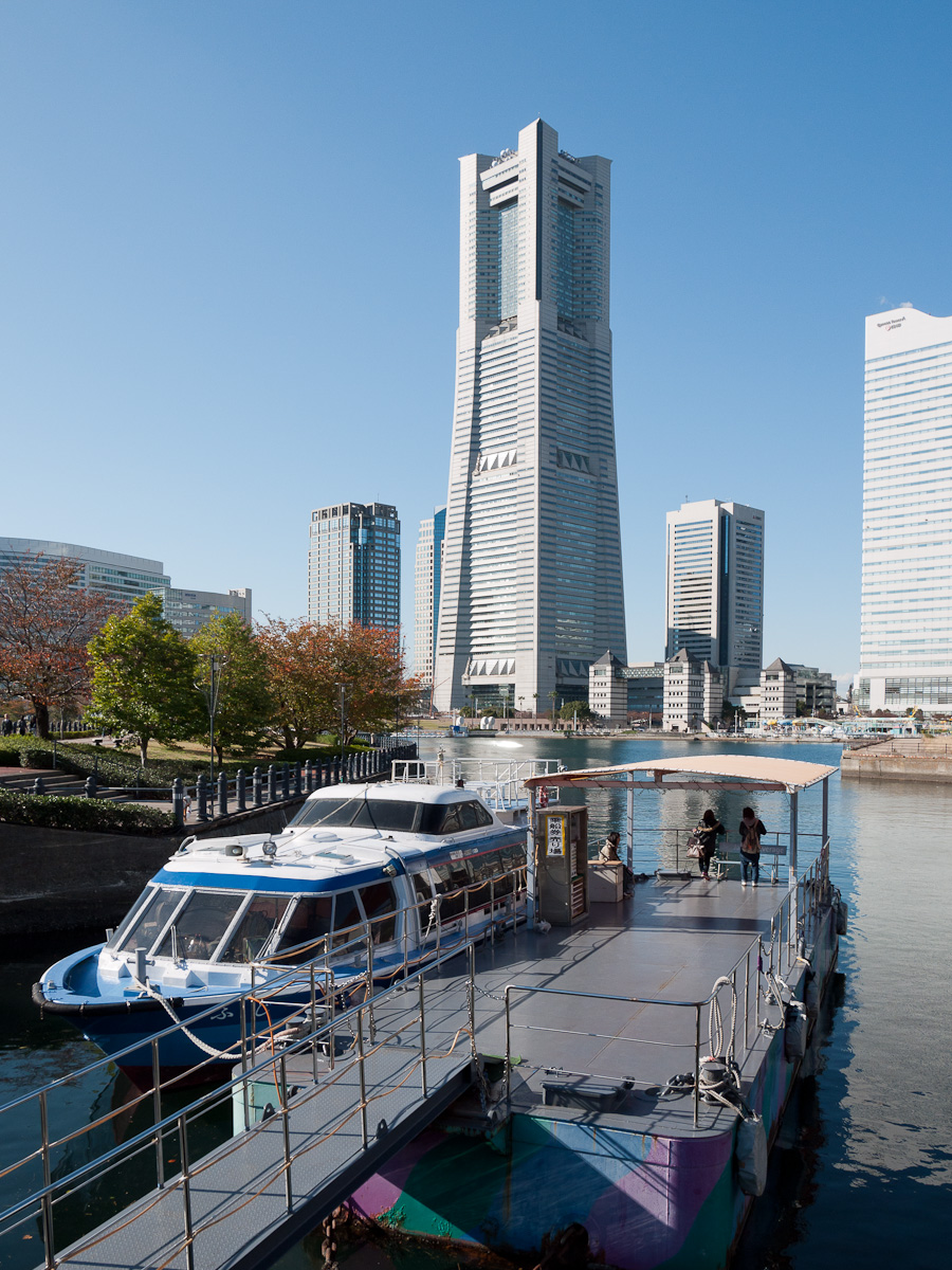 横浜ランドマークタワー。